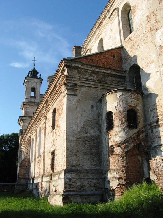 Олика. Західний фасад колегіального костелу